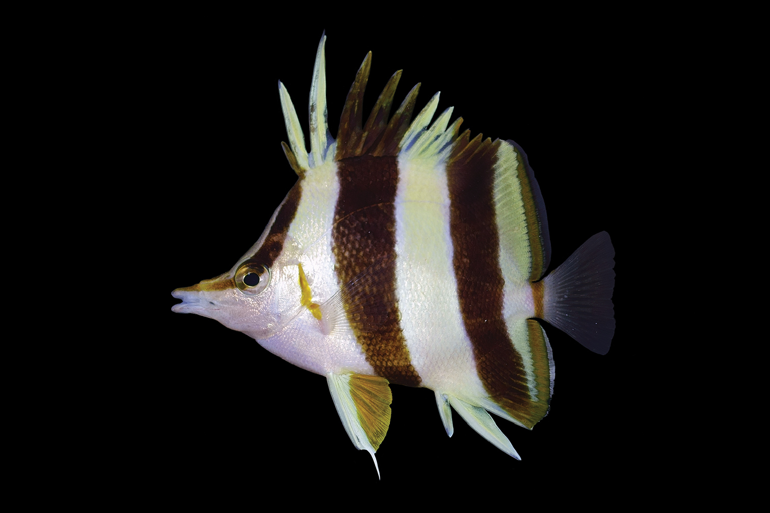 Prognathodes basabei, holotipo recolectado a 61 m, en el atolón de Pearl and Hermes, Hawái, EE.UU.